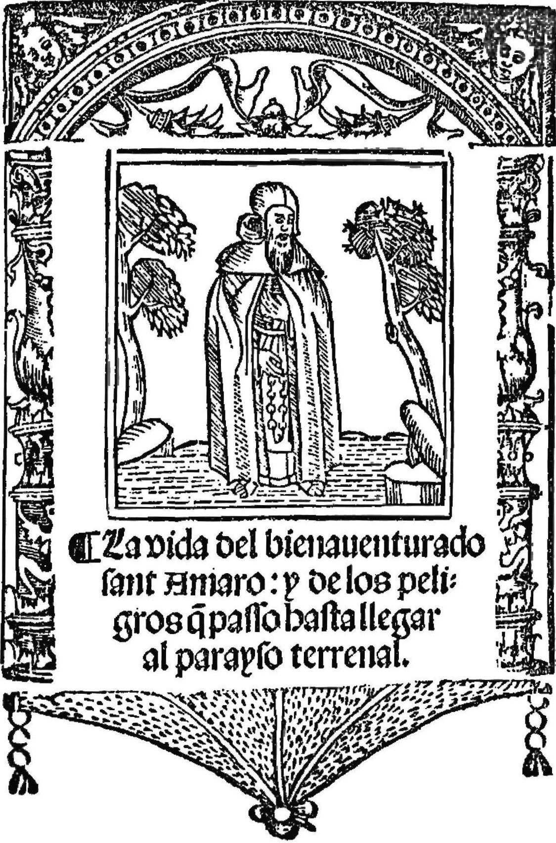 Cover of La vida del bienaventurato Sant Amaro, Biblioteca del Escorial